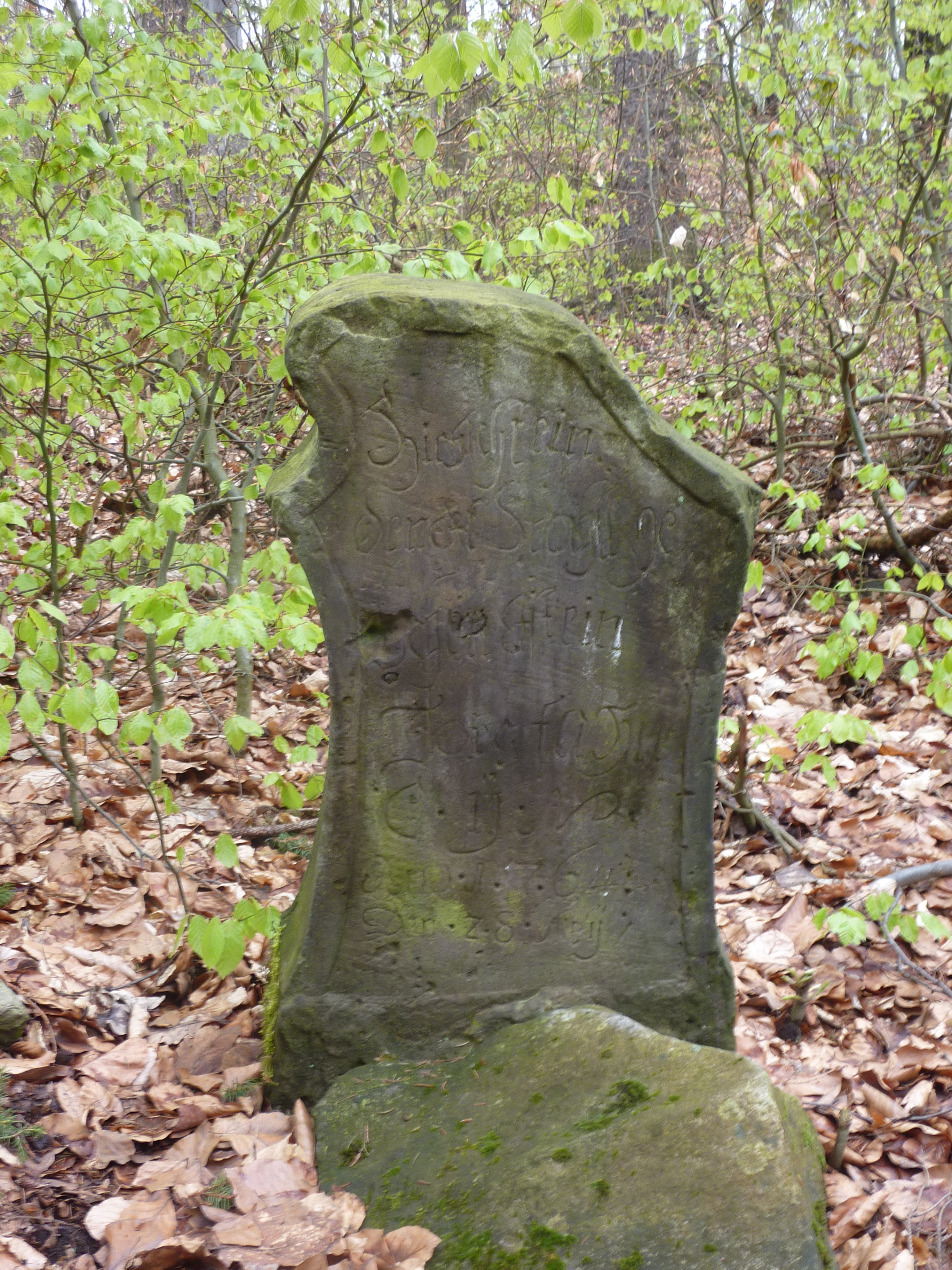 Gedenkstein am Forstenberg, Spitzkunnersdorf